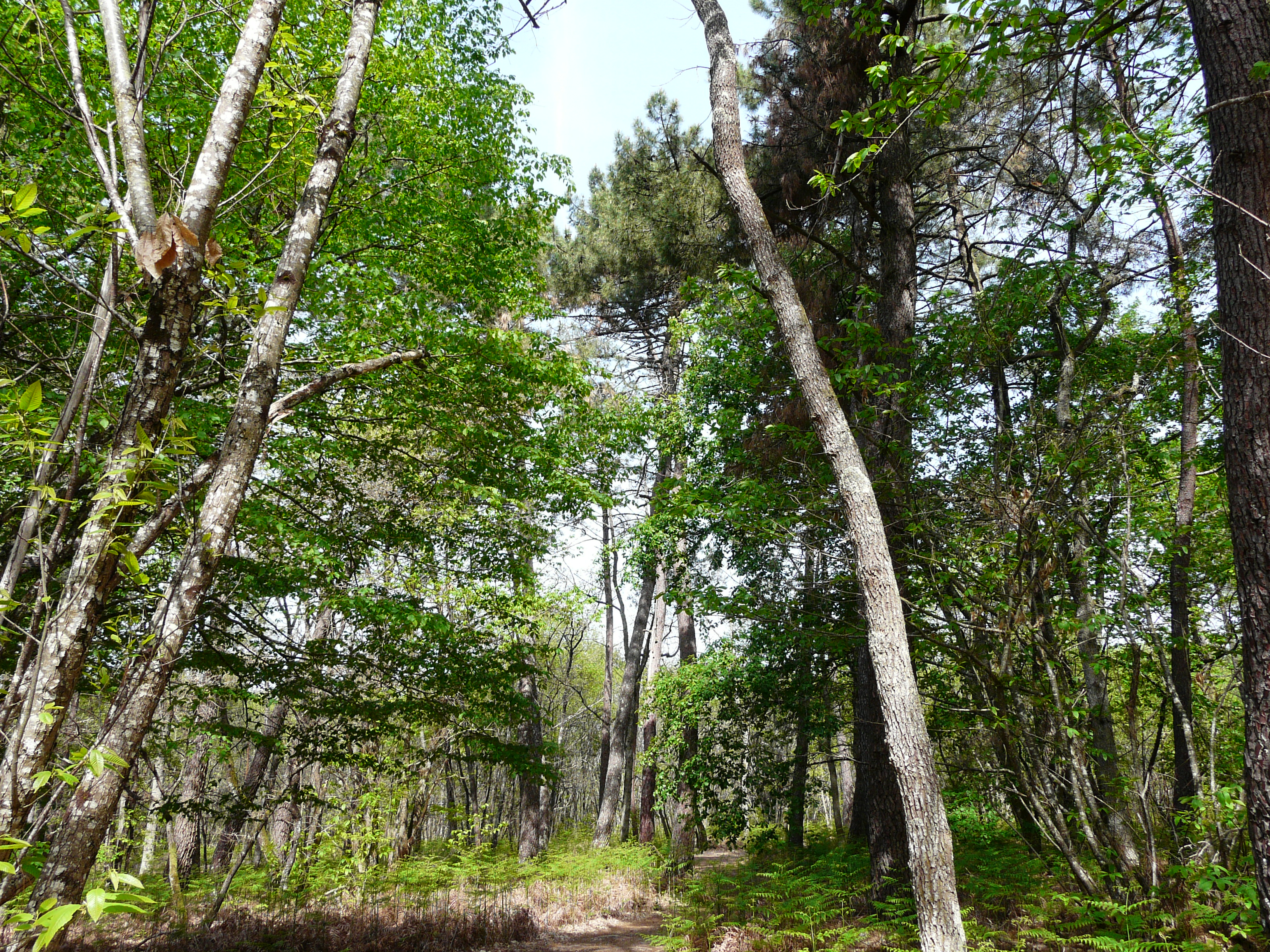 La forêt de Liorac près du lieu-dit le Dougnou, Saint-Sauveur, Dordogne, France.